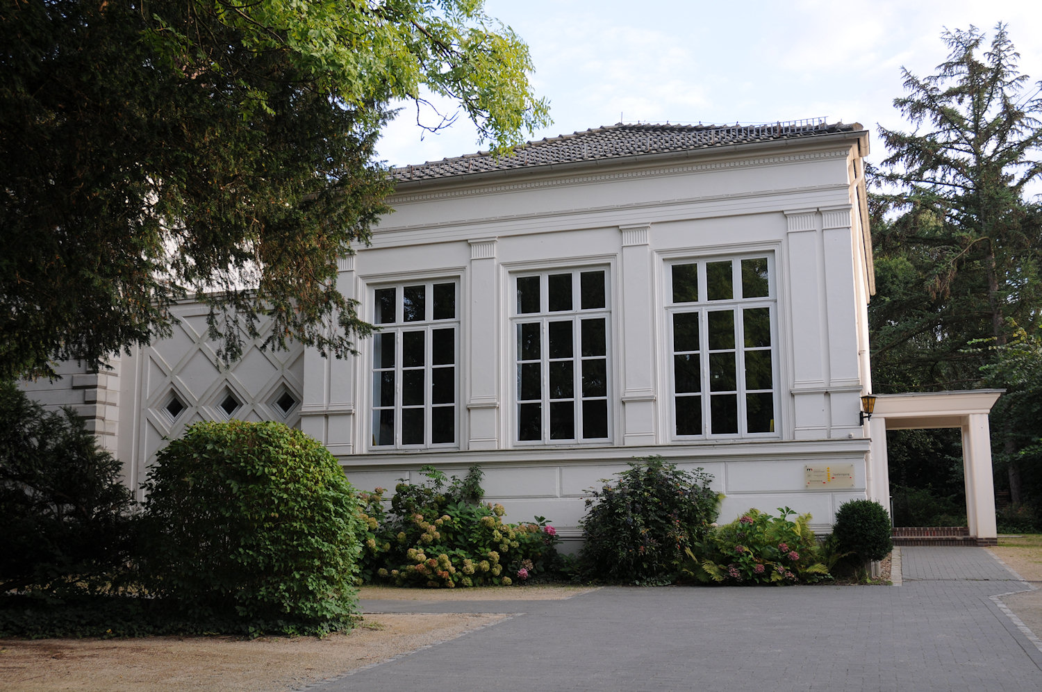 Pfarrhaus Horn I in Bremen, Berckstraße 27. Westlicher Teil.Das abgebildete Objekt ist ein geschütztes Kulturdenkmal in der Freien Hansestadt Bremen, mit der Nr. 0122 beim Landesamt für Denkmalpflege registriert.